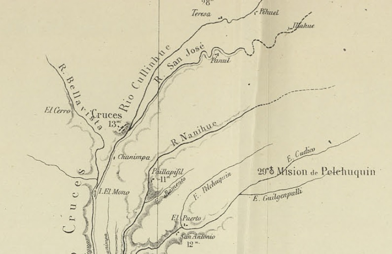 De Cruces a Pelchuquin en el Mapa de la Expedicion de Francisco Vidal Gormaz 1869